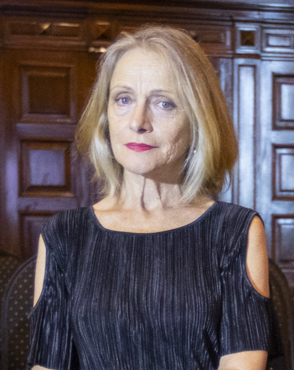 Beatriz Spelzini en el evento "Nosotras movemos el mundo", el 7 de marzo de 2020 en el Centro Cultural Kirchner. Buenos Aires, Argentina. Recorte de la imagen original.